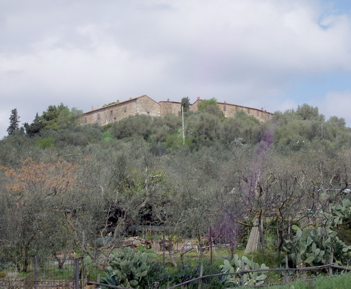 Il complesso del Castello di Valle a Follonica visto da sud